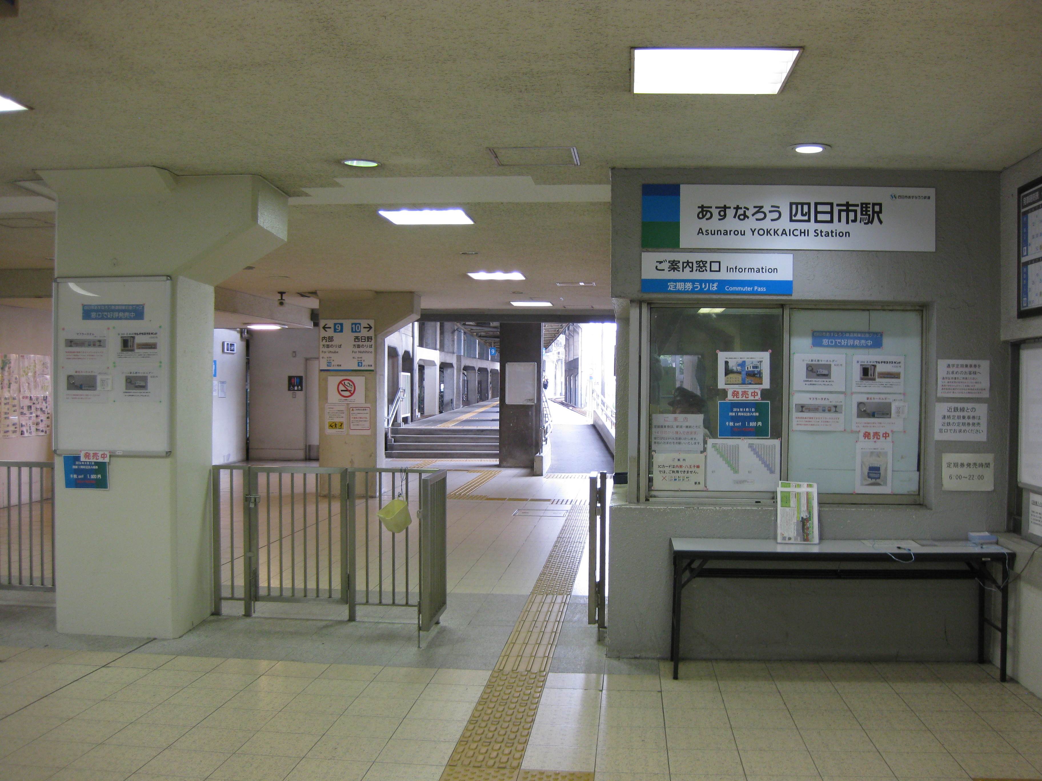 あすなろう四日市駅改札口